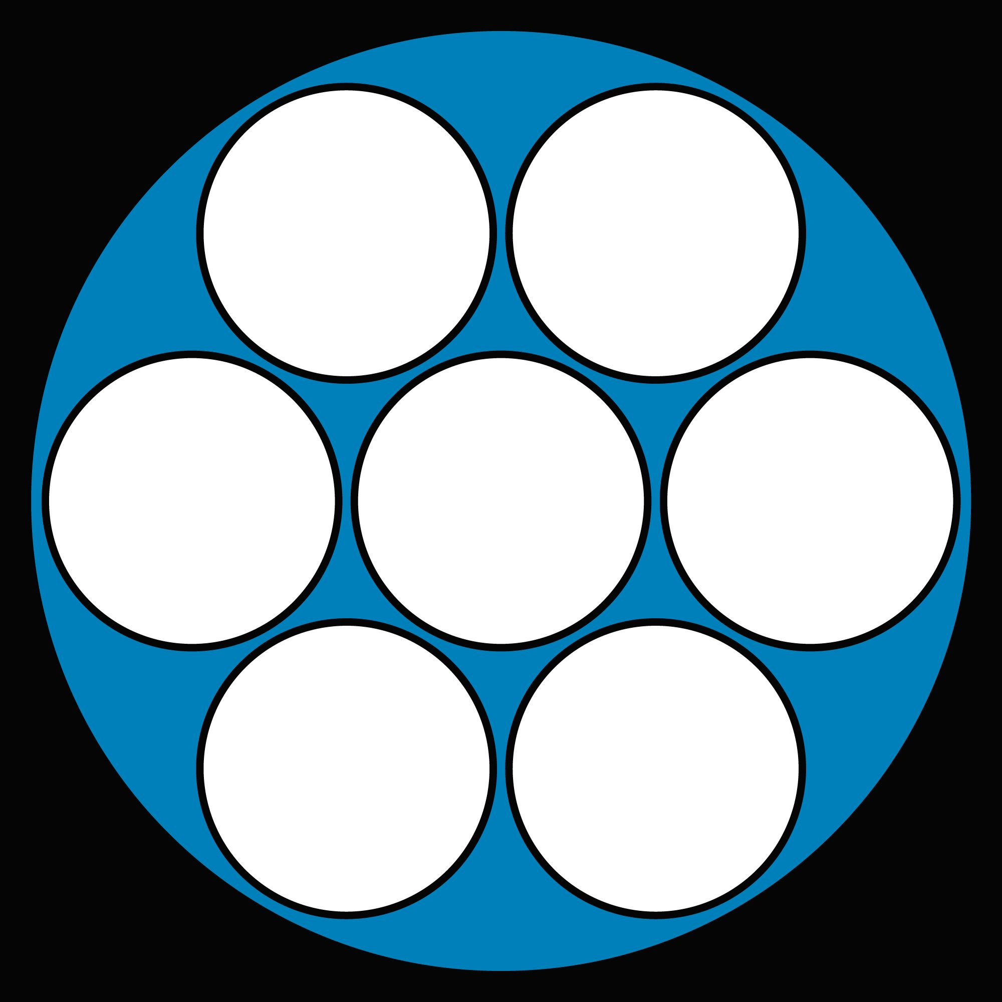 telefone espiritual dos pleiadianos